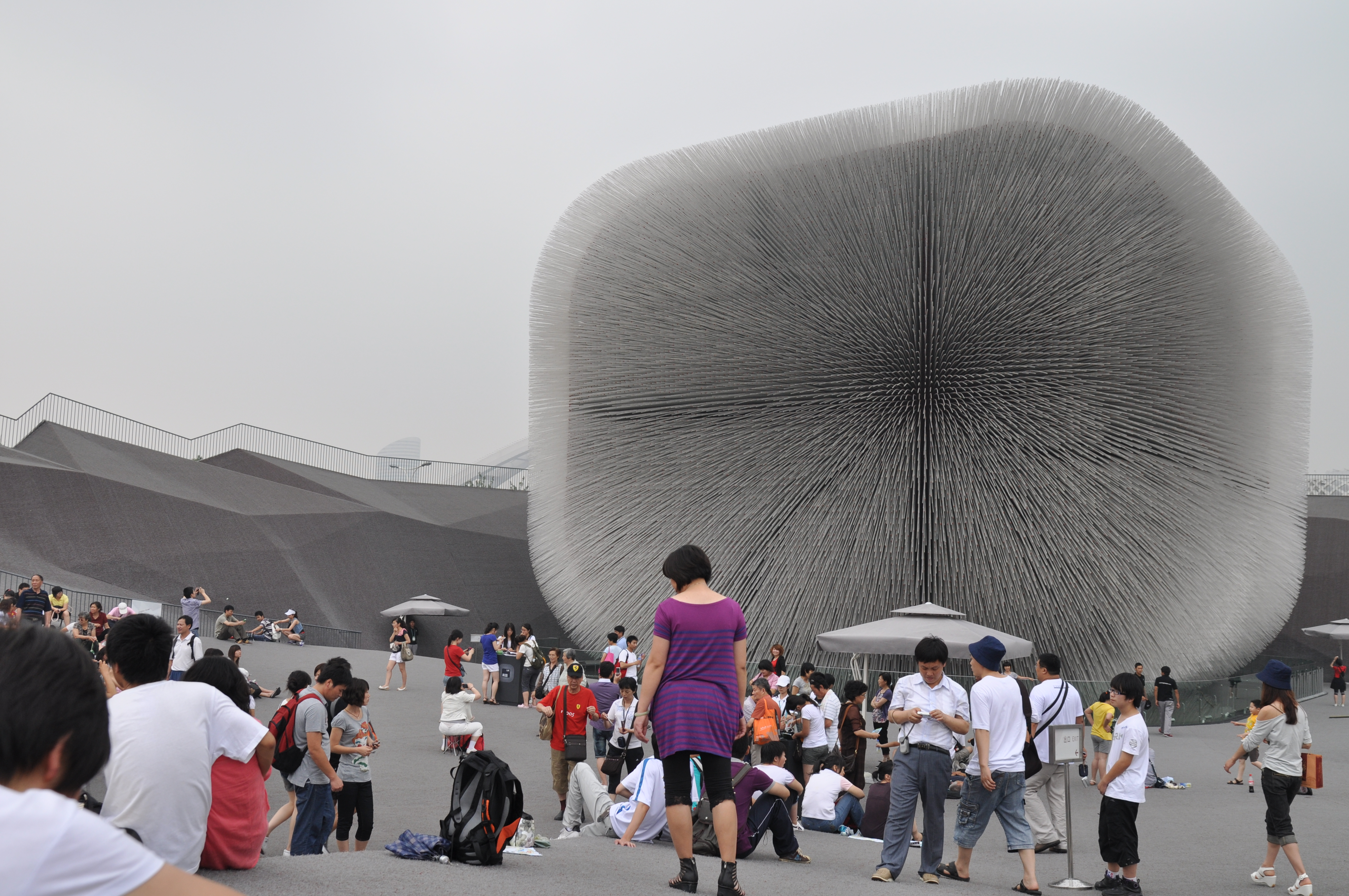 Оригинальный "Собор семян" покрыт тонкими «ресничками» из оргстекла, в каждой из которых содержатся семена различных растений.